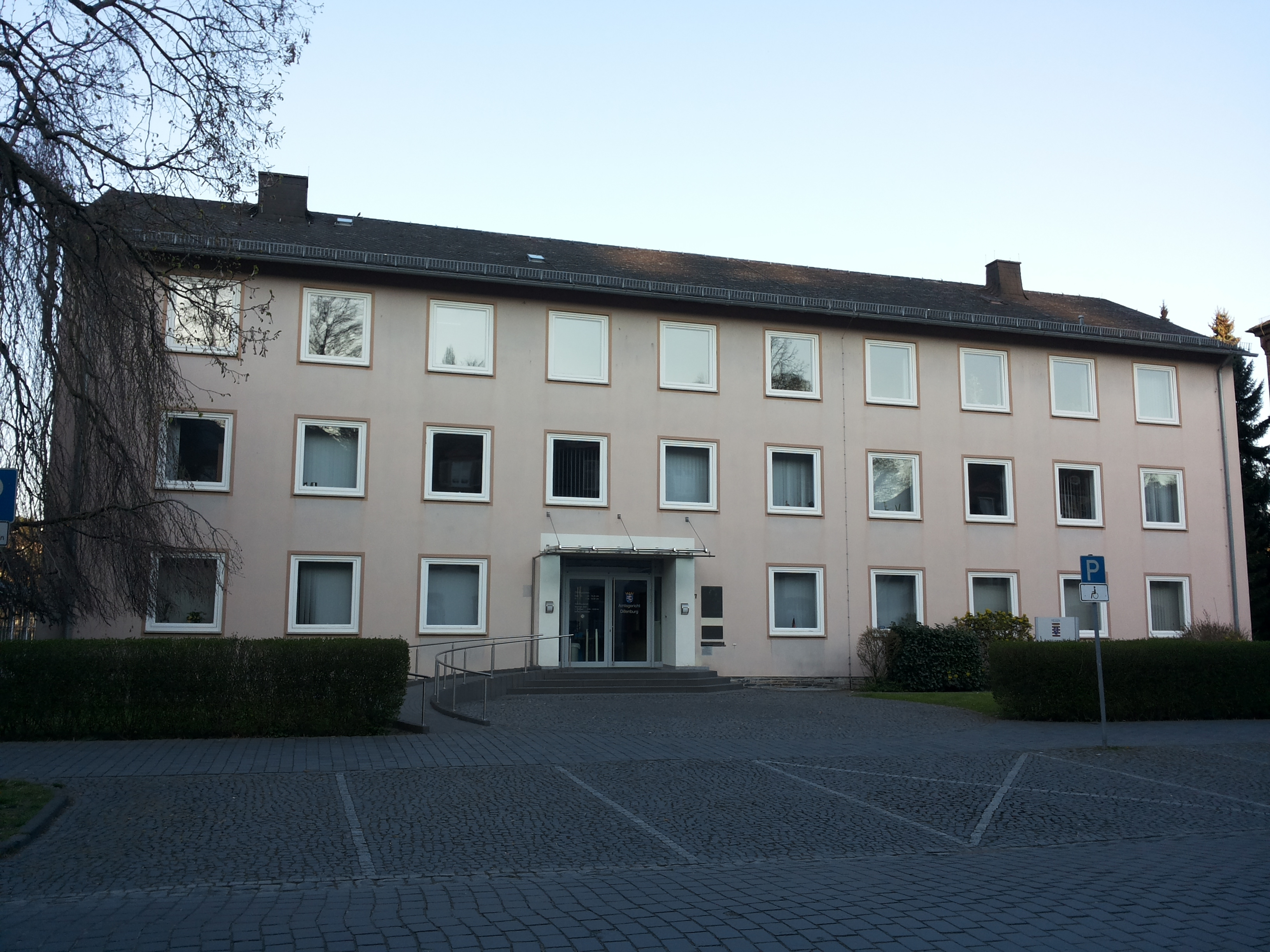 Dillenburg, Haus - Amtsgericht, Wilhelmstraße 7, Ensembleschutz - Teil der Sachgesamtheit Wilhelmstraße 4-24 und der Gesamtanlage